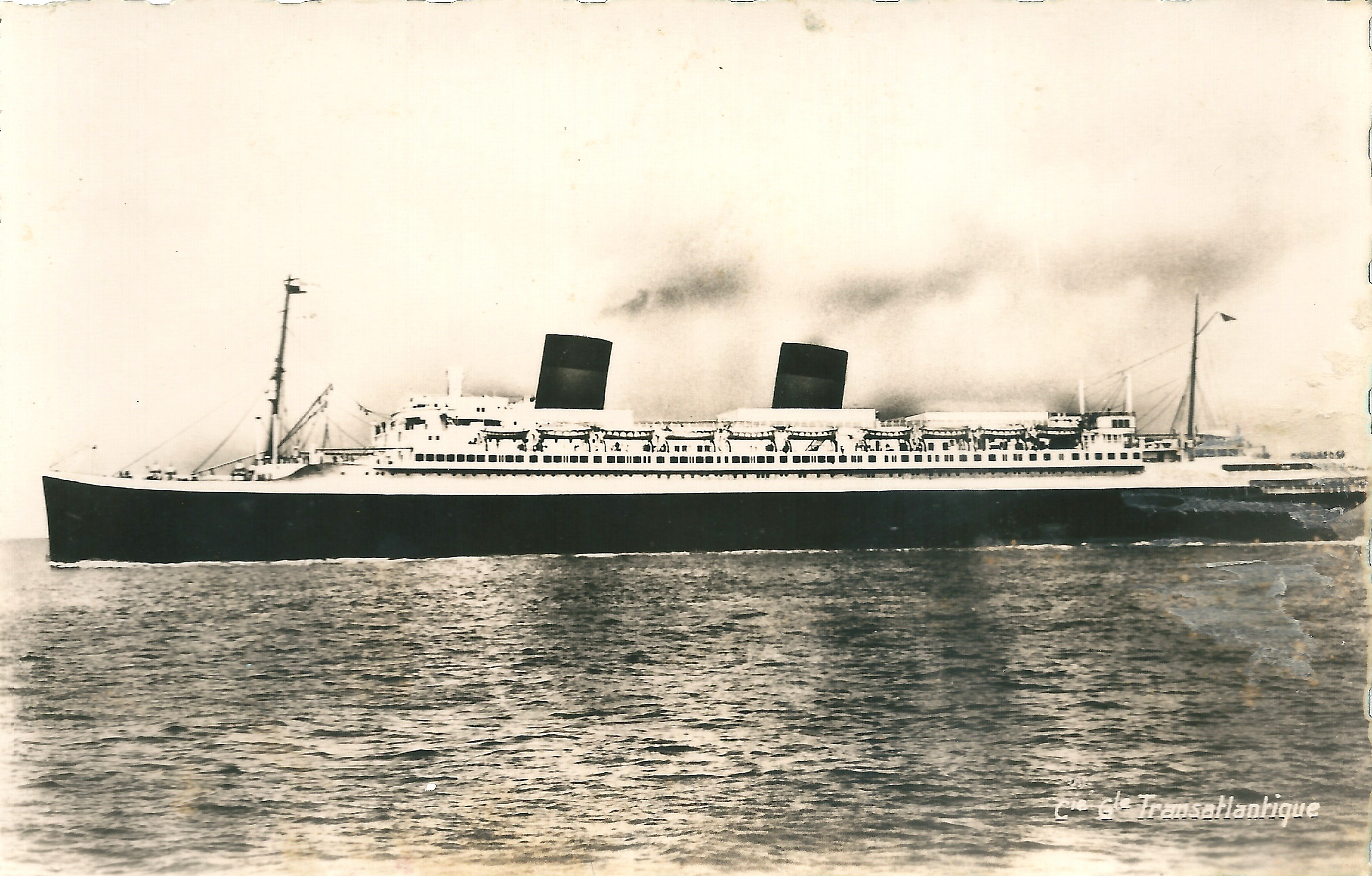 Le paquebot Ile de France" rénové